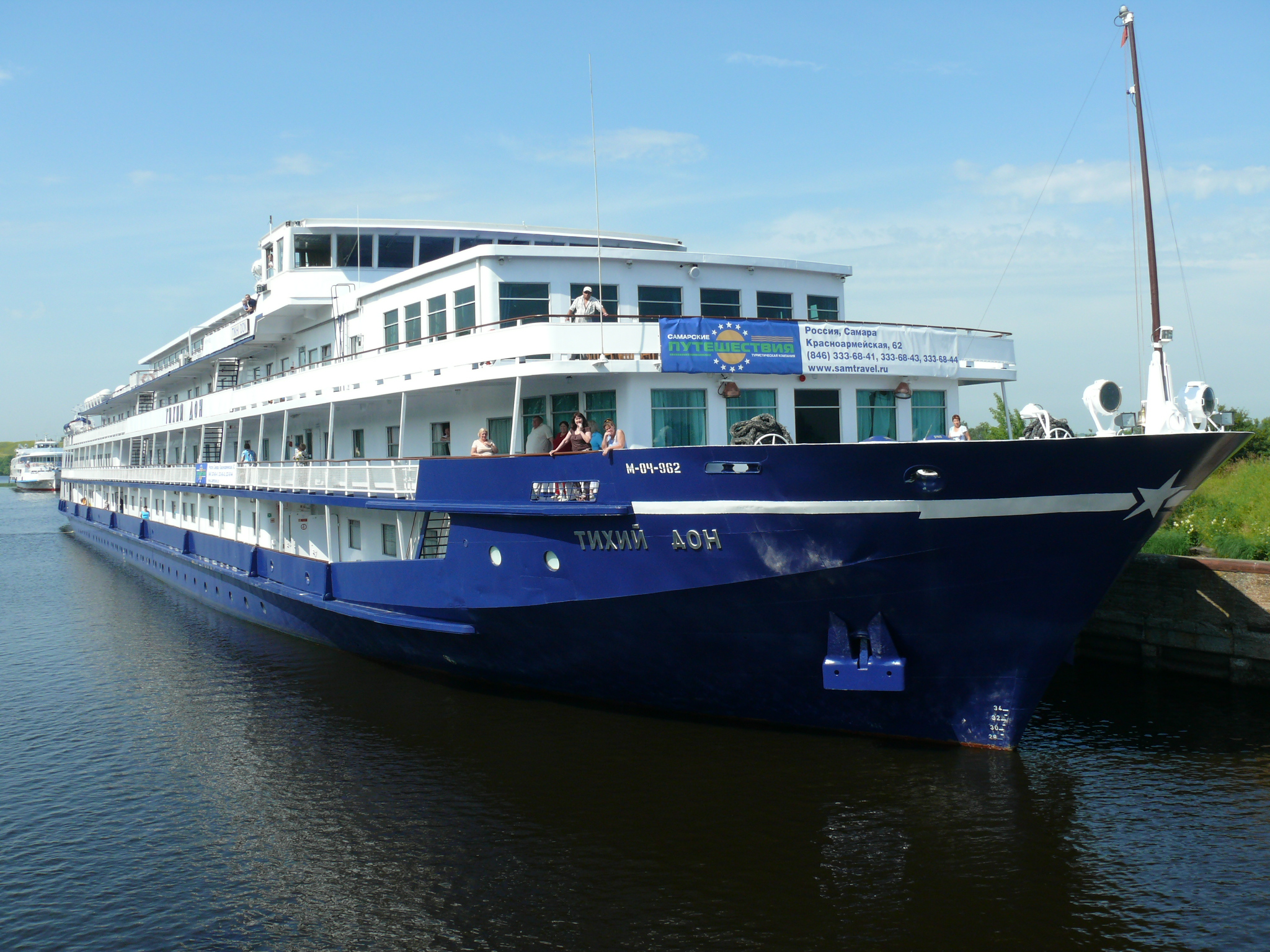 Теплоход "Тихий Дон".